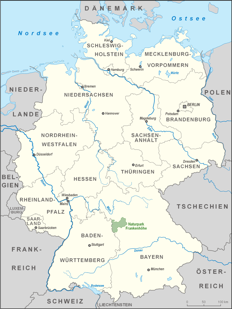 Karte des Naturparks Frankenhöhe in Deutschland